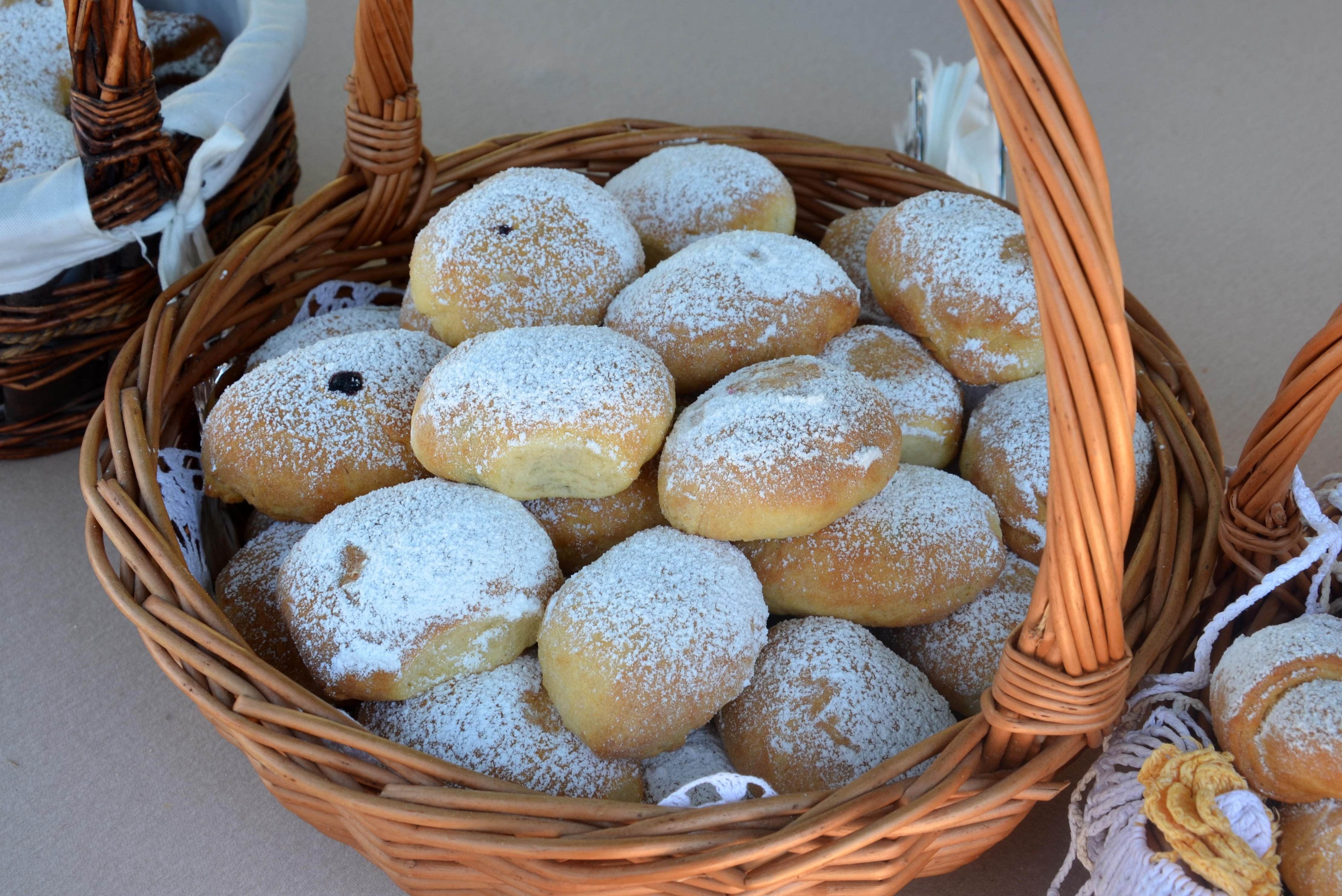 Kaiser Franz Butterbrötchen, Przemysl